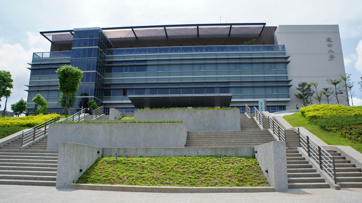 逢甲大學創新育成中心，位於中部科學工業園區臺中園區。